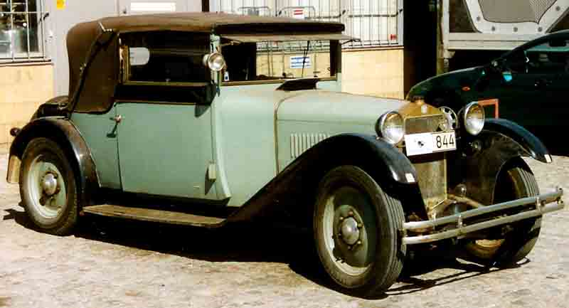 Steyr XII Cabriolet 1930